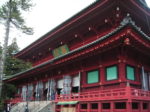 2004年(平成16年)11月2日に投稿者が撮影したものです。Stanislaus 2005年3月28日 (月) 11:10 (UTC)